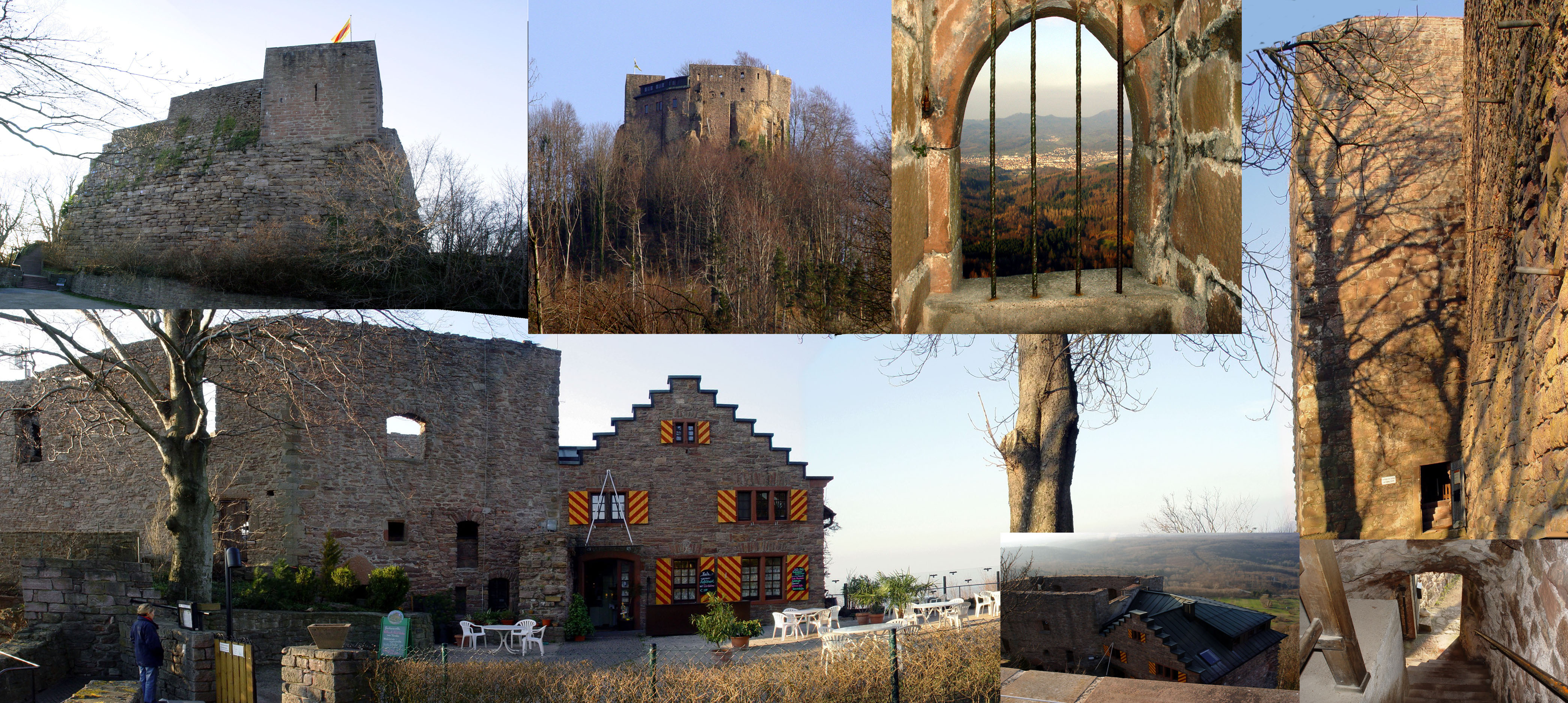 Fotografiert von Martin Dürrschnabel. Verschiede Blicke auf die Ruine Ebersteinburg.